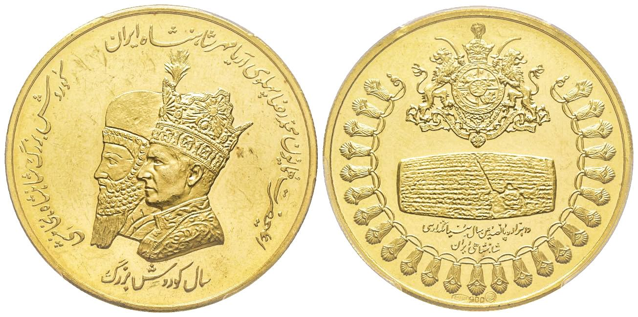 مدال طلای یادبود سال کوروش بزرگ روی مدال: نیمرخ چپ محمدرضا پهلوی و نگاره ای از کوروش هخامنشی پشت مدال: نقش مخصوص جشنهای دوهزار و پانصد سال شاهنشاهی ایران